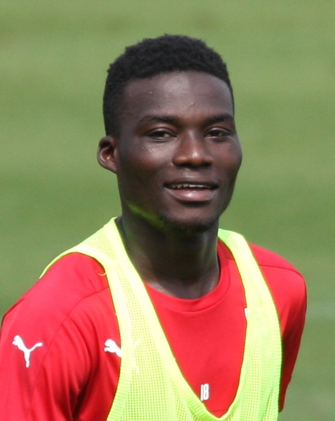 Hans Sarpei beim VfB-Training. Aufgenommen von